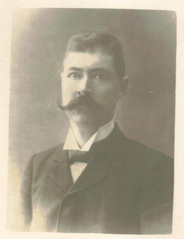 Портрет на Христо Матов